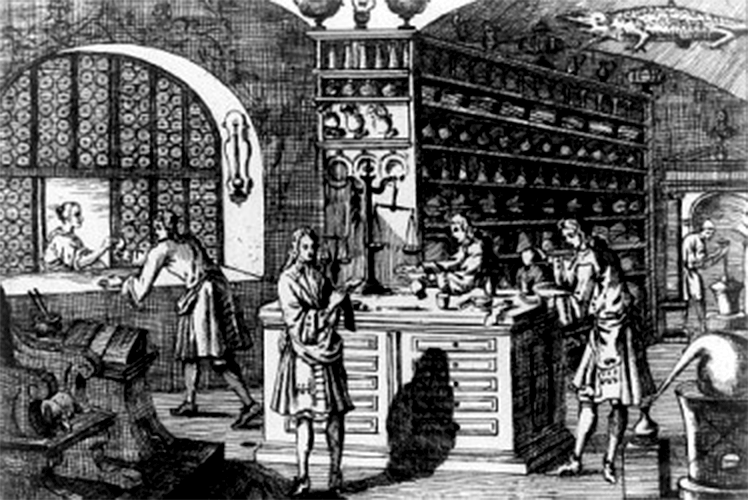 Offizin der Engel Apotheke in Darmstadt